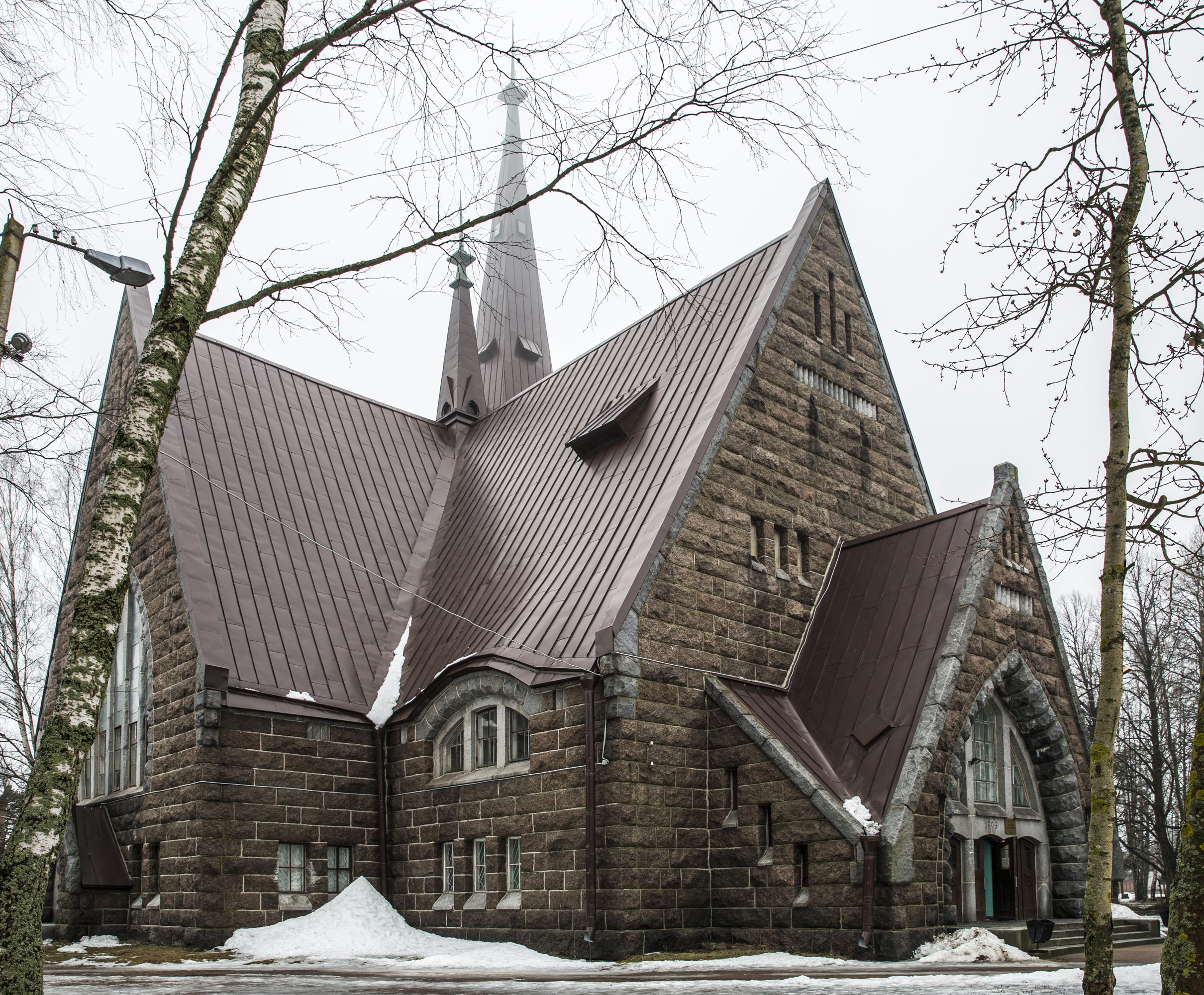 Койвисто.Кирха, лютеранская церковь, Приморск